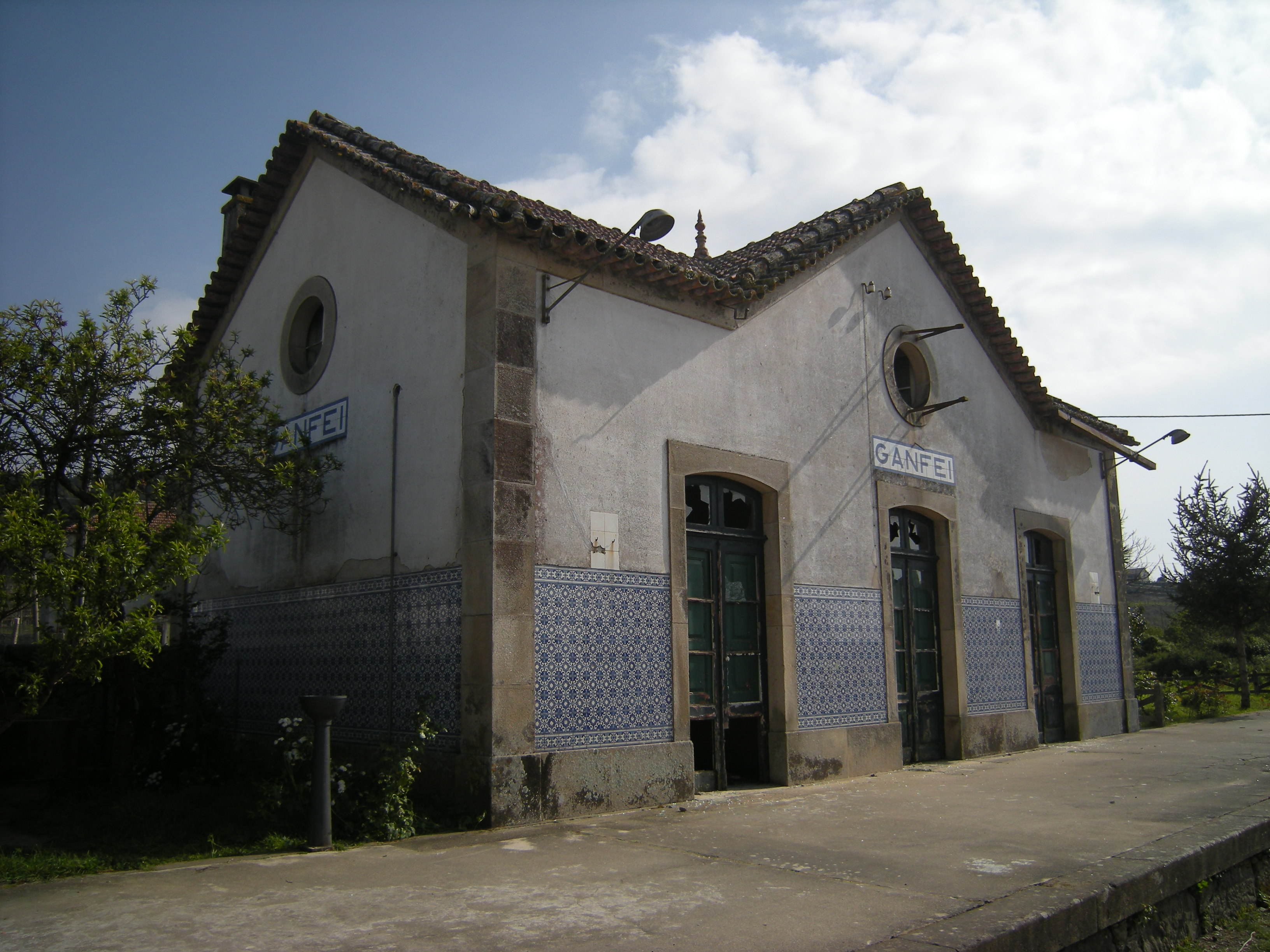 Antigua estación de Ganffei.